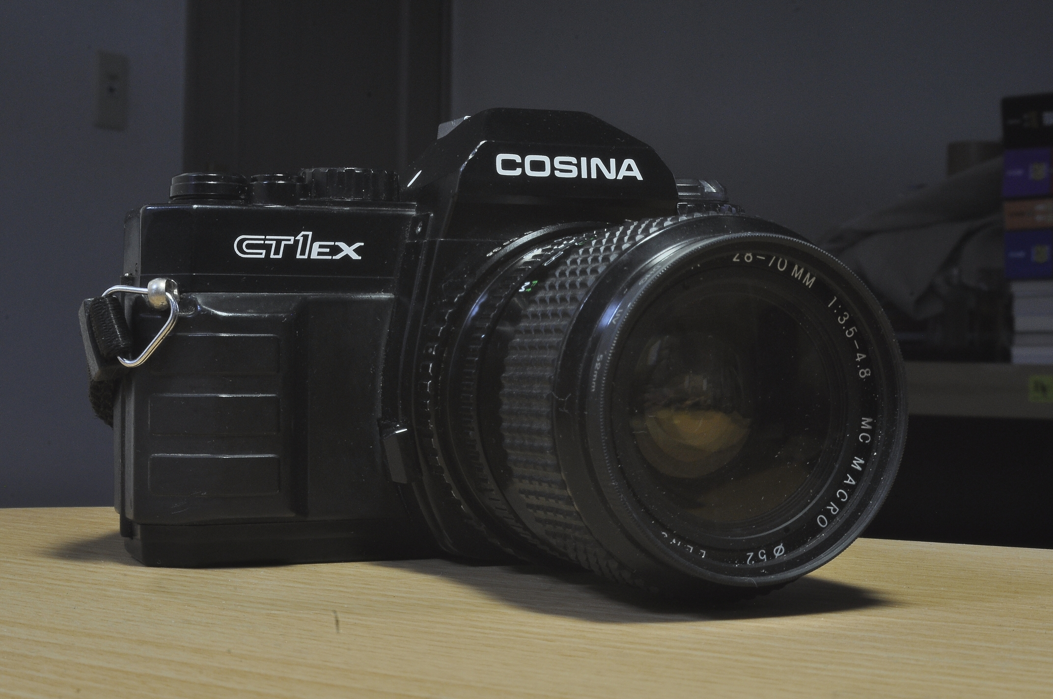 カメラ本体：コシナCT-1EX レンズ：コシナMCマクロ28-70mm 1:3.5-4.8